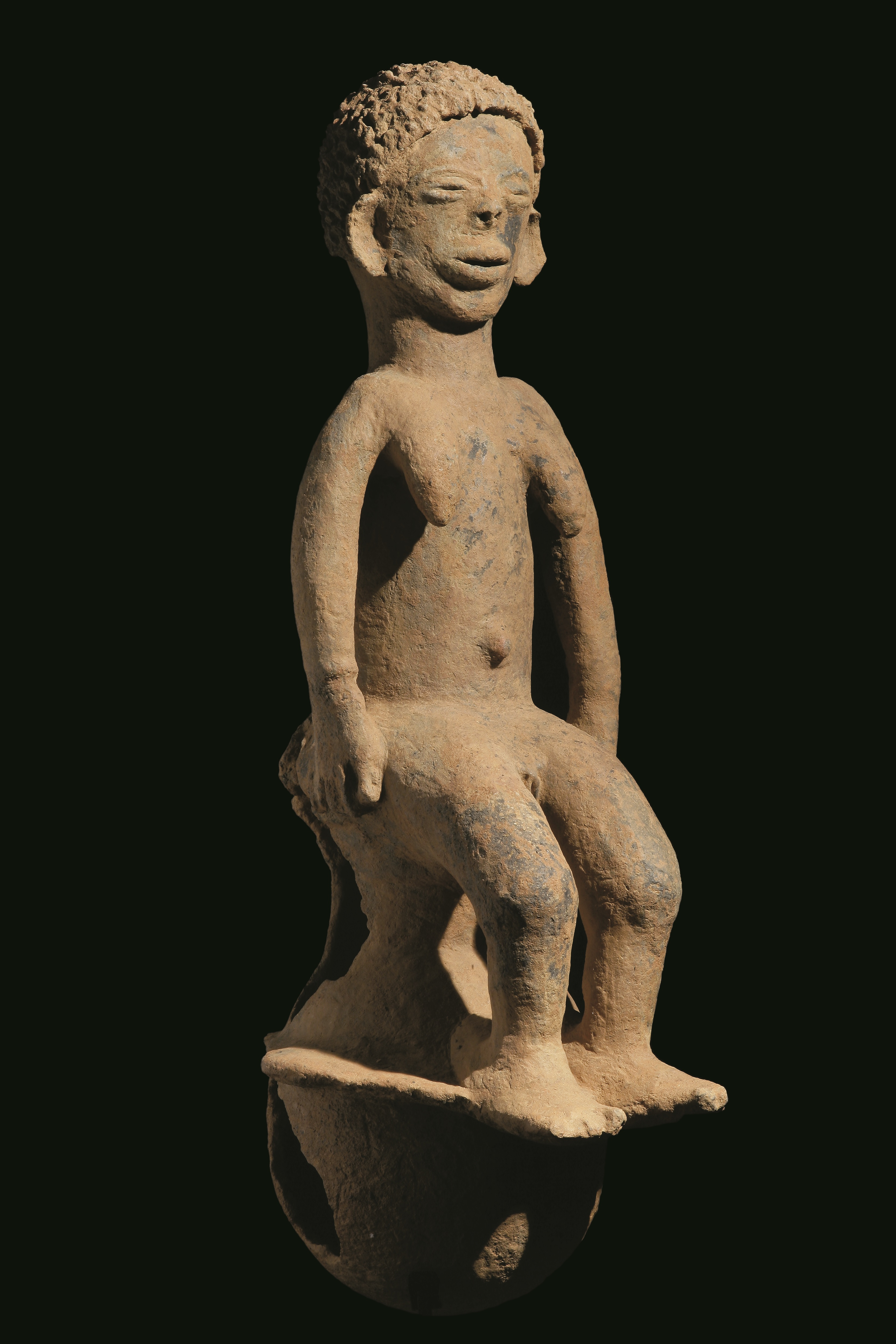 Esta mujer se encuentra expuesta junta con otra escultura masculina, de 80 cm de altura cada una de ellas. Se trata del único conjunto de pareja en barro cocido de la cultura Jukun hallado hasta el momento. Están datadas entre los siglos XIII y XV y proceden de Nigeria.